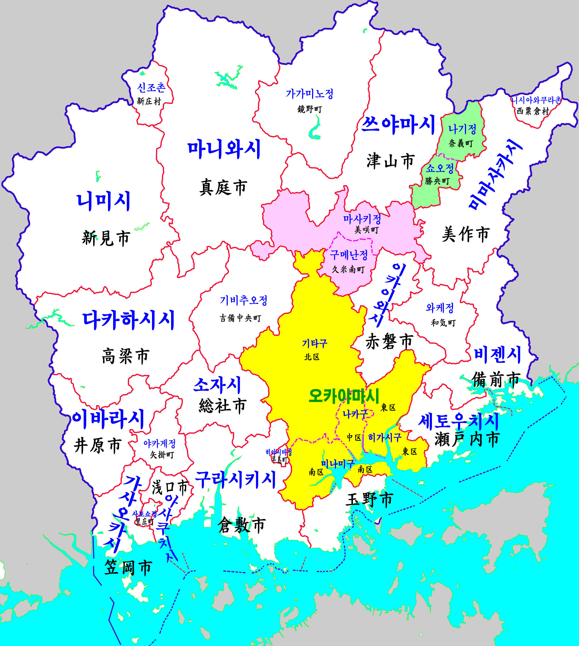 오카야마현 행정구역